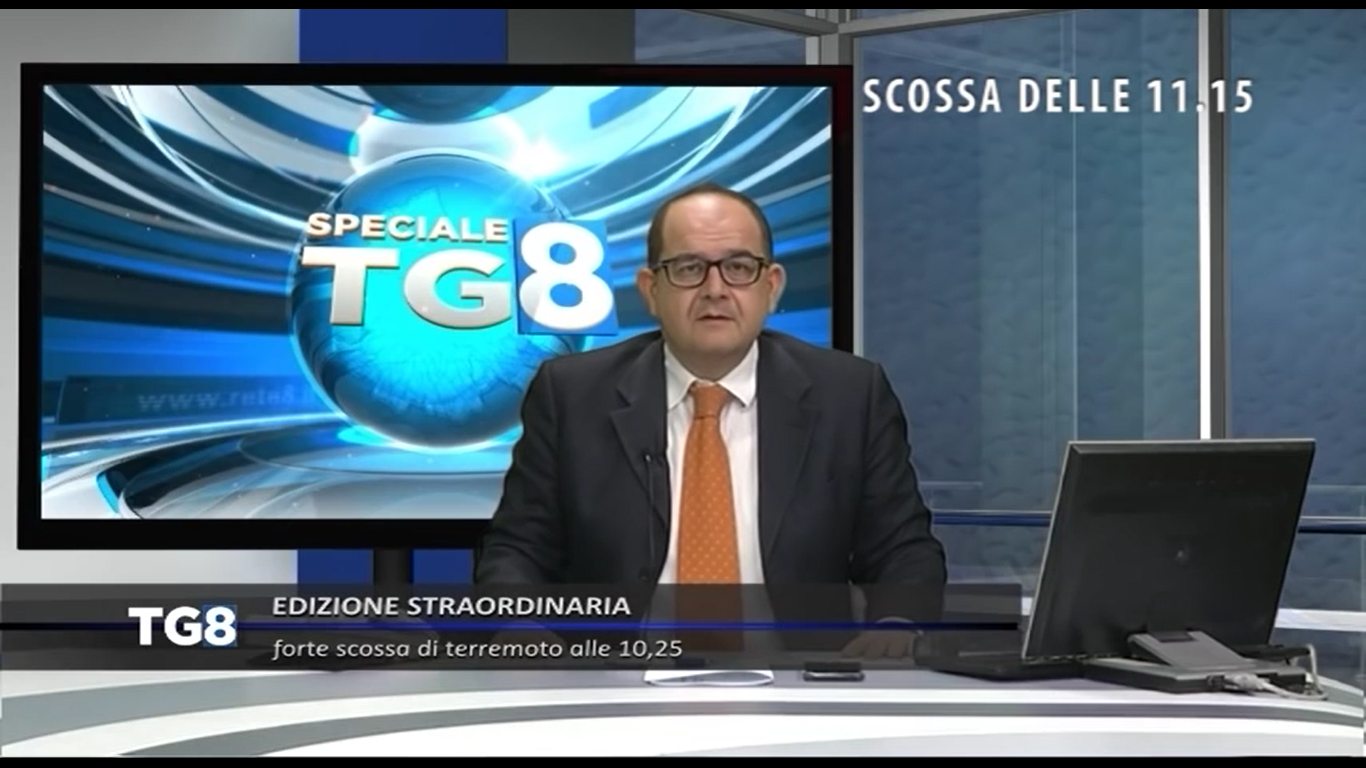 Edizione straordinaria del TG8, programma televisivo di Rete8, sulle scosse sismiche del 18 gennaio 2017